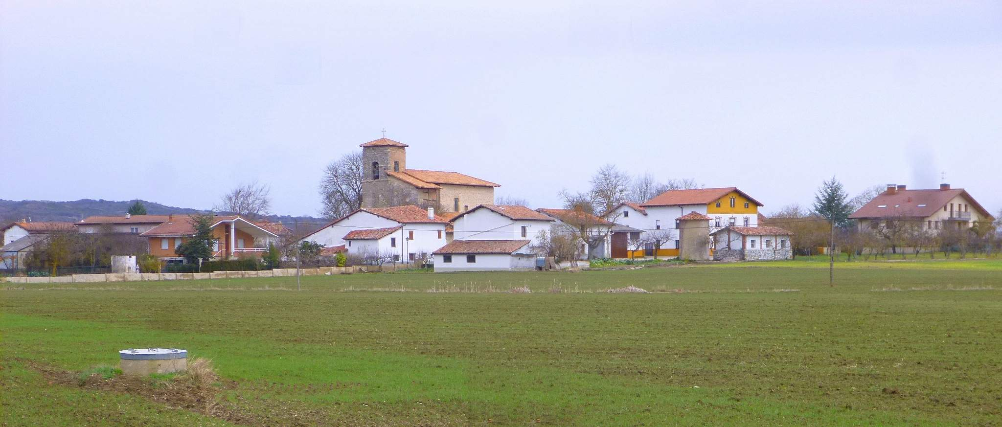 Lopidana (Vitoria, Álava)